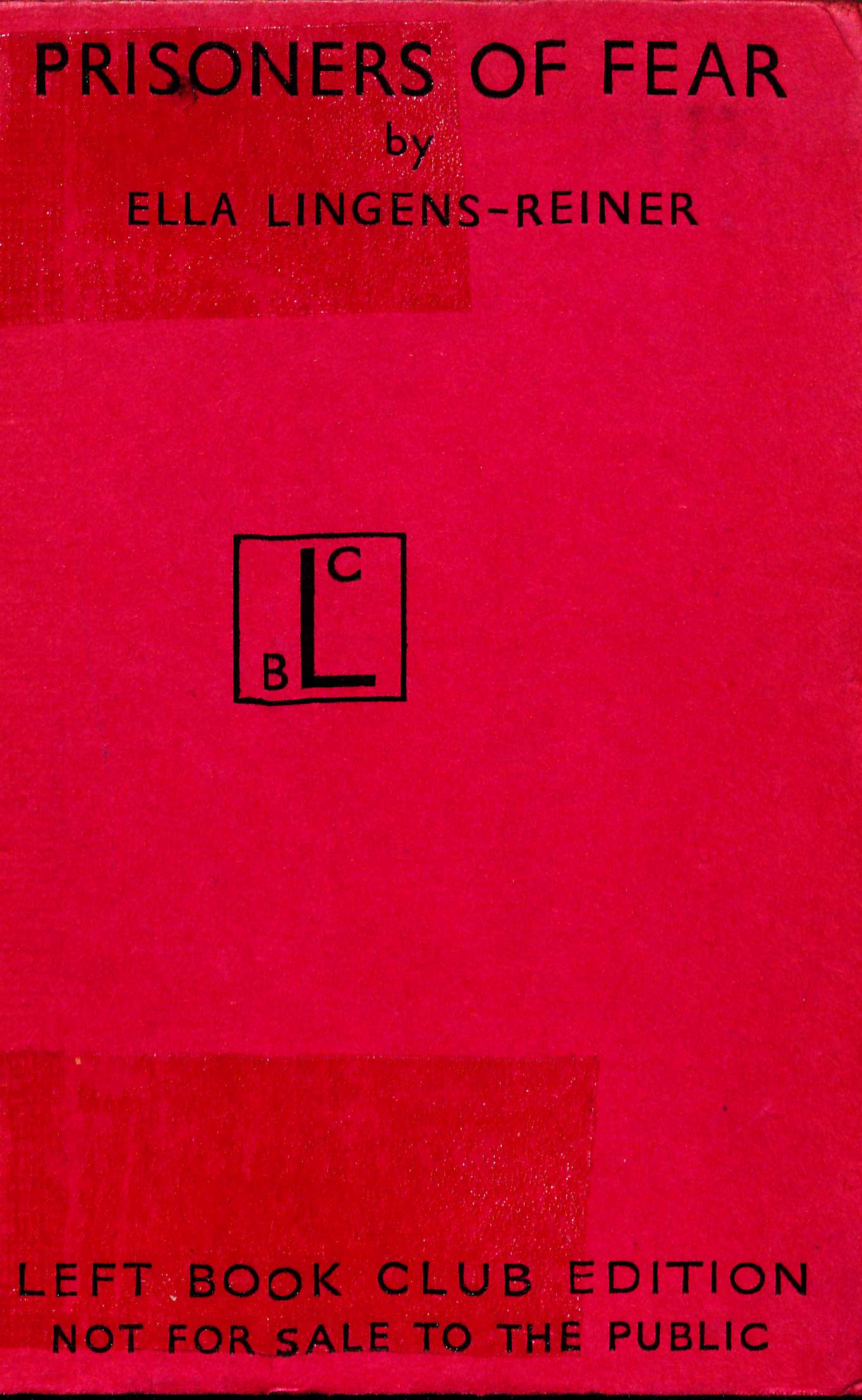 Ella Lingens-Reiner Prisoners of Fear. London: Victor Gollancz, 1948To my little son asking him to forgive me those years of my absence.